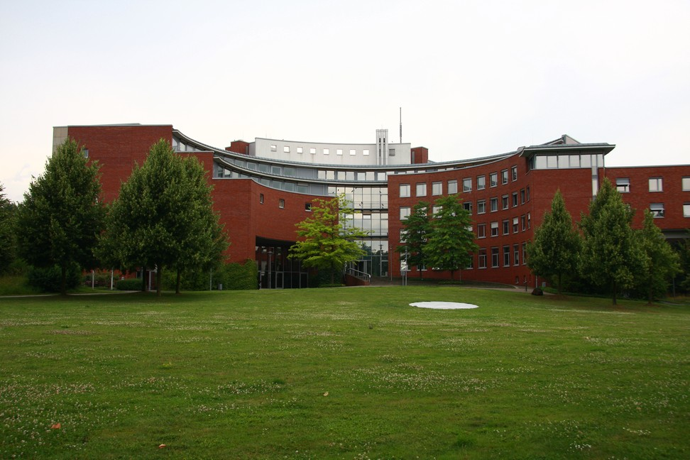 Die Fachhochschule des Bundes für öffentliche Verwaltung in Brühl